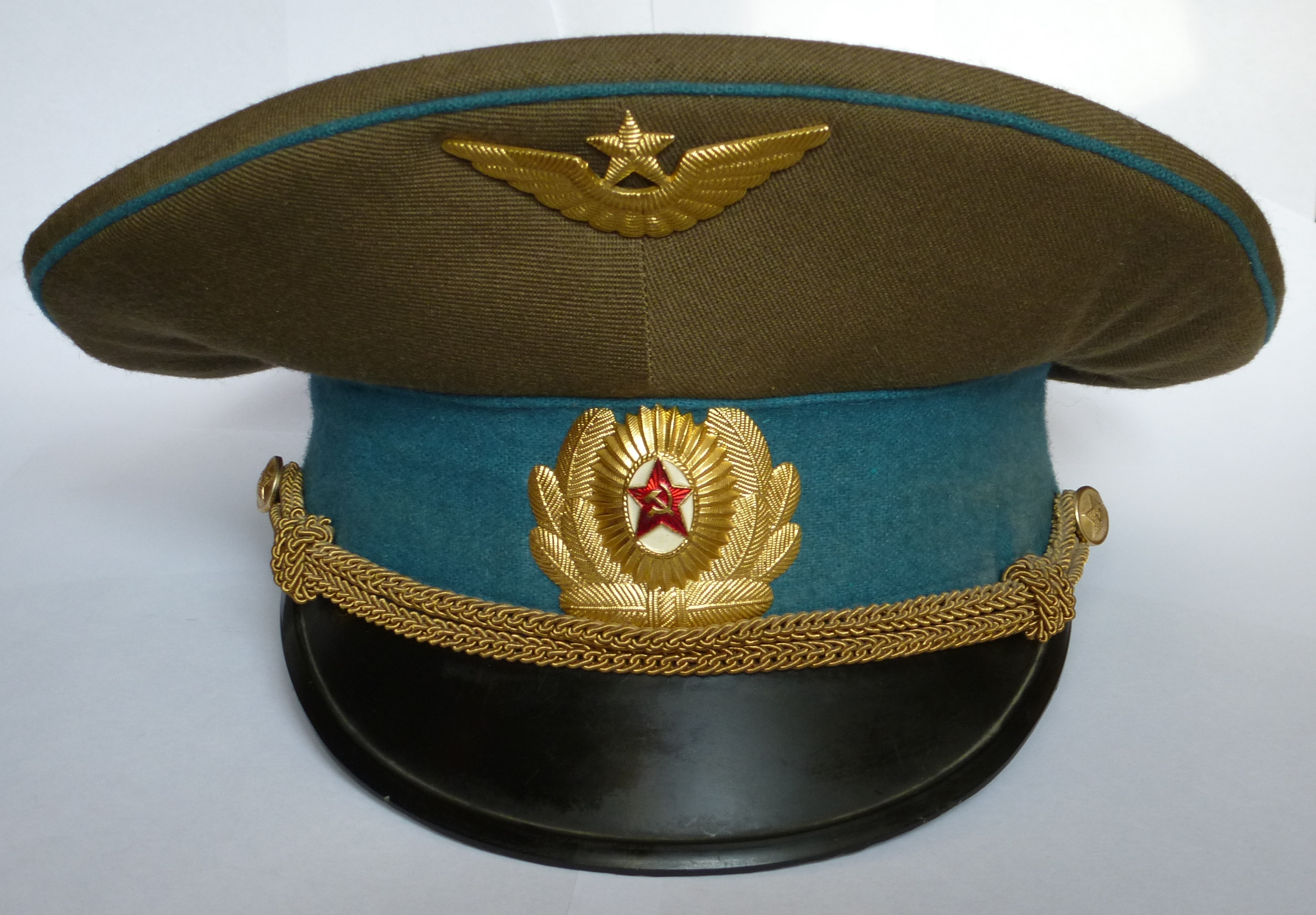 Офицерская фуражка к повседневной форме одежды ВВС и ВДВ ВС СССР. 1969-1991г.г.